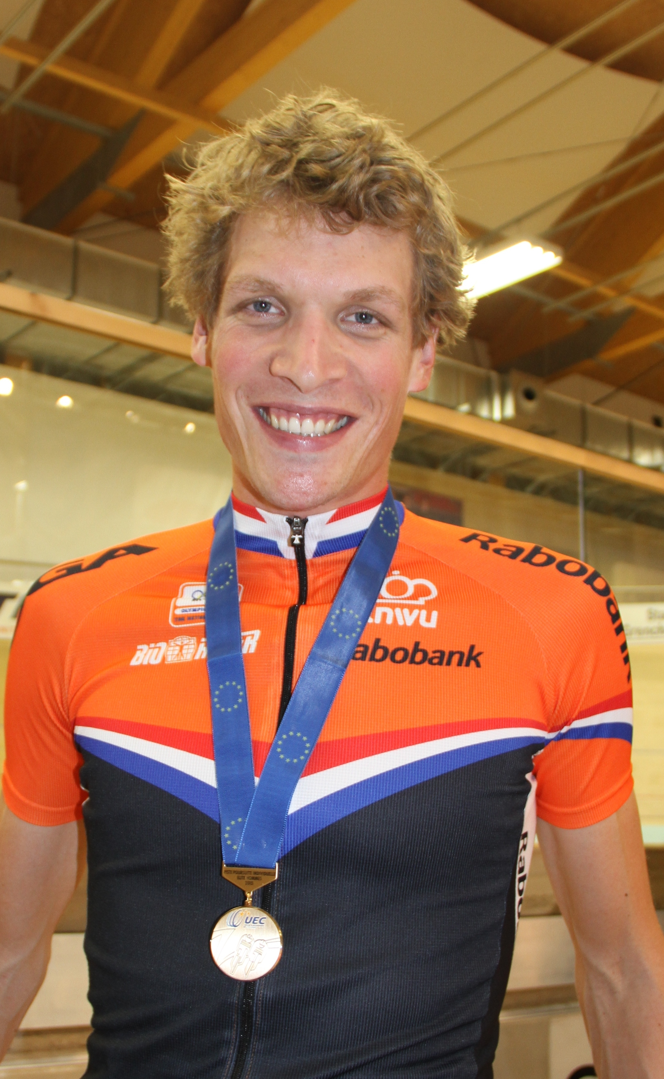 Dion Beukeboom, niederländischer Radsportler The making of this document was supported by the Community-Budget of Wikimedia Germany.